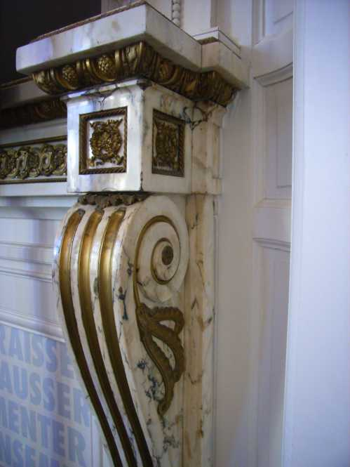 Detail eines Cheminées (Stilkamin), Marmorsorte aus dem Gebiet Carrara, Bronzeauflagen (ca. 1800)